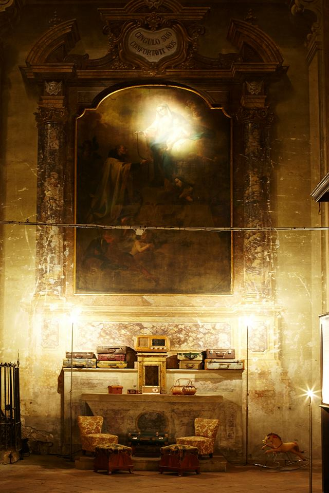 Primo altare a sinistra dall'ingresso con una delle cappelle laterali affrescate in stile barocco dal pittore piacentino Domenico Stroppa _ photo © Michele Costa